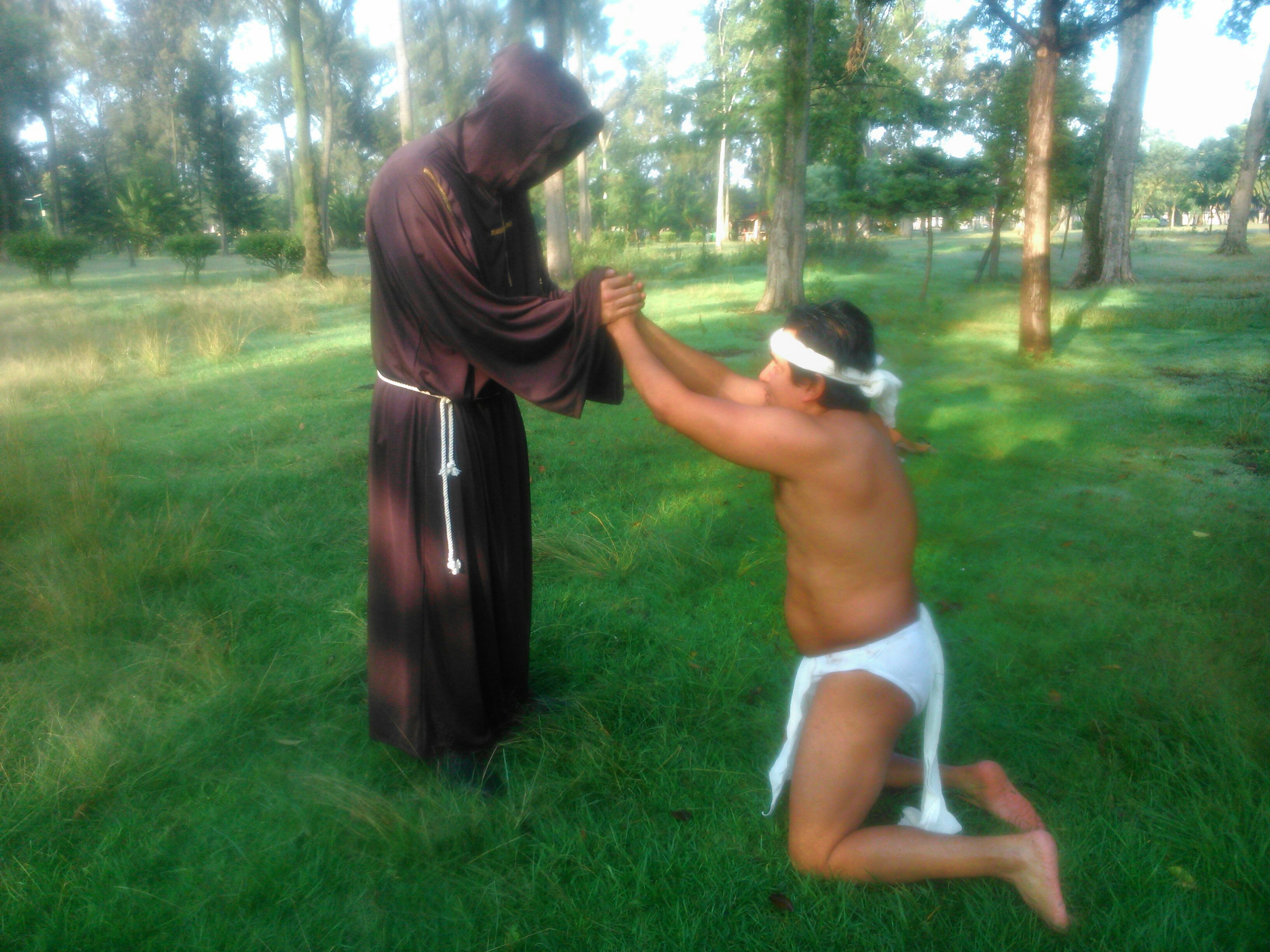 La religiosos protegieron a los indígenas de los abusos y les inculcaron su religión.